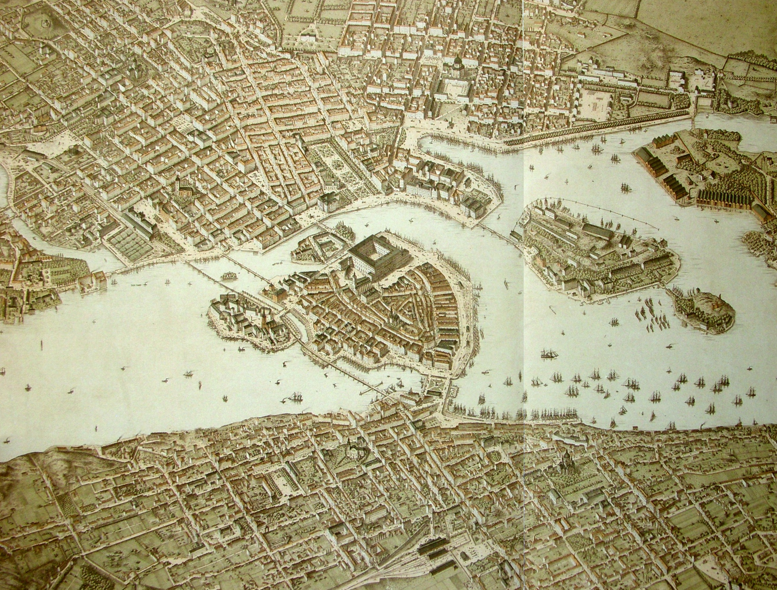 Litografen Heinrich Neuhaus panorama över Stockholm från 1870-talet, sedd från en punkt över Södermalm